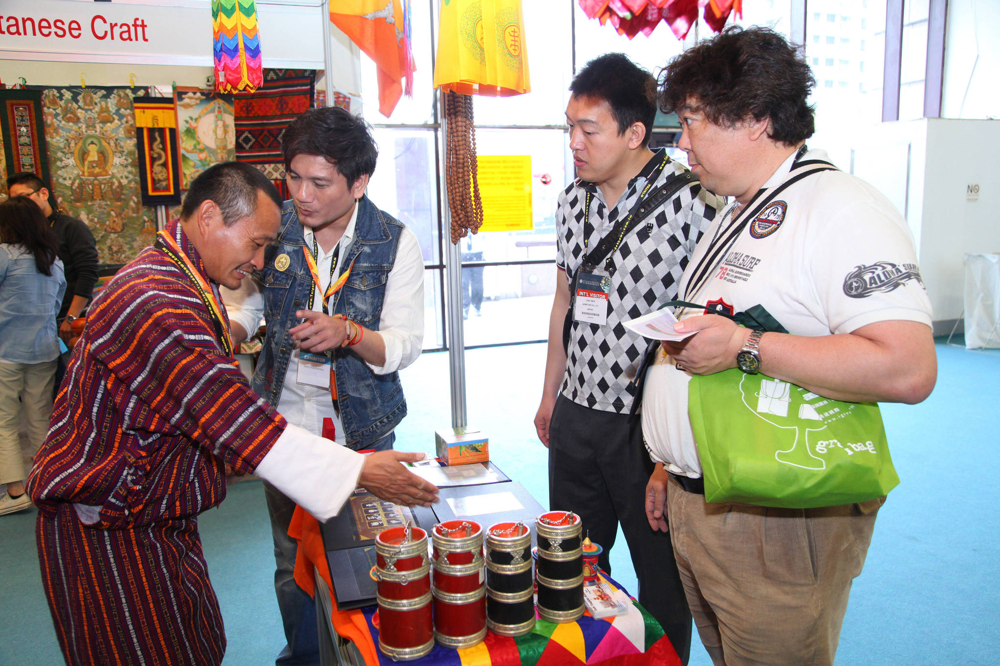 Giftionery Taipei 2012 不丹展團攤位